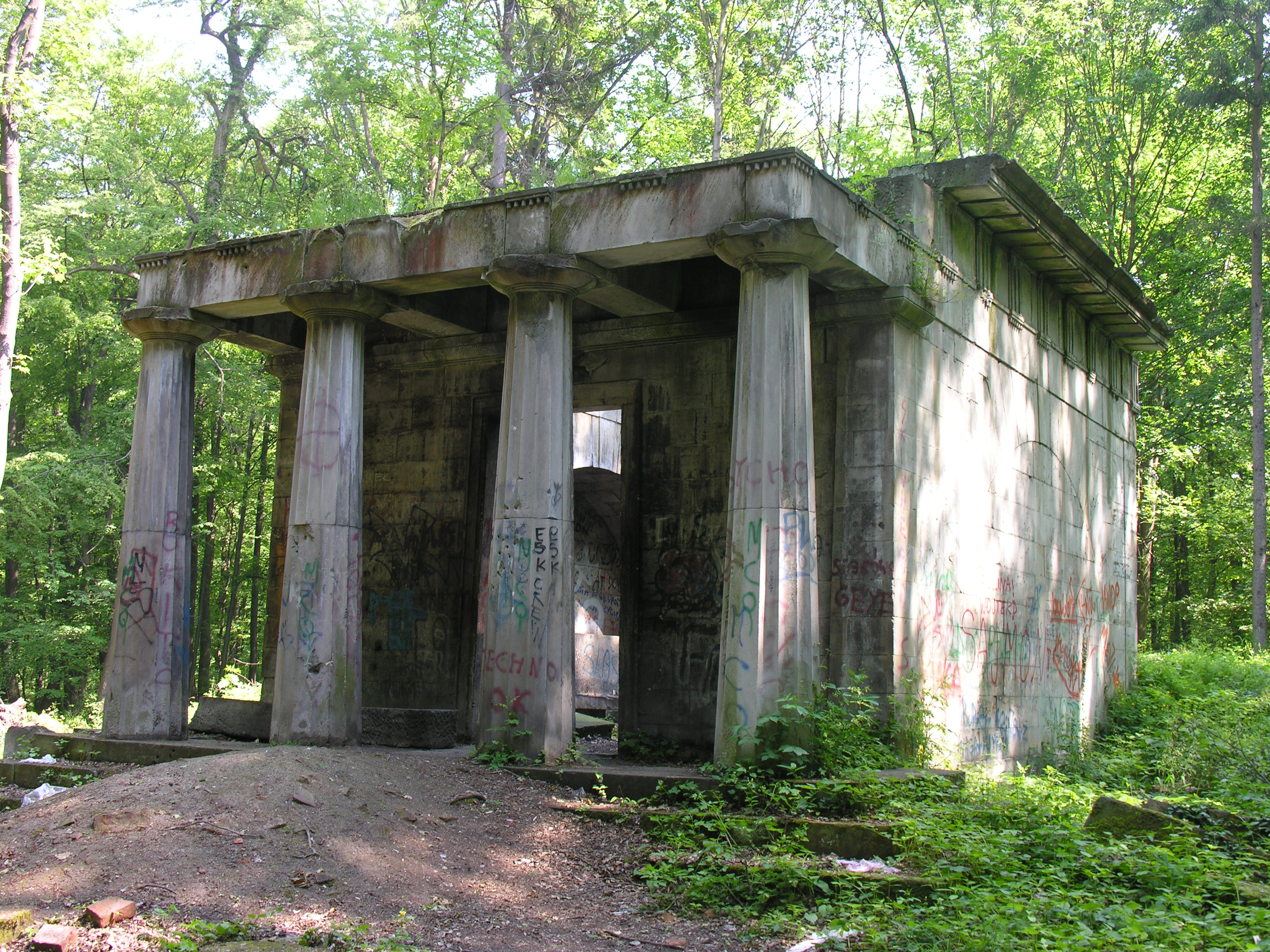 Mauzoleum Karla Georga Heinricha von Hoyma w Brzegu Dolnym